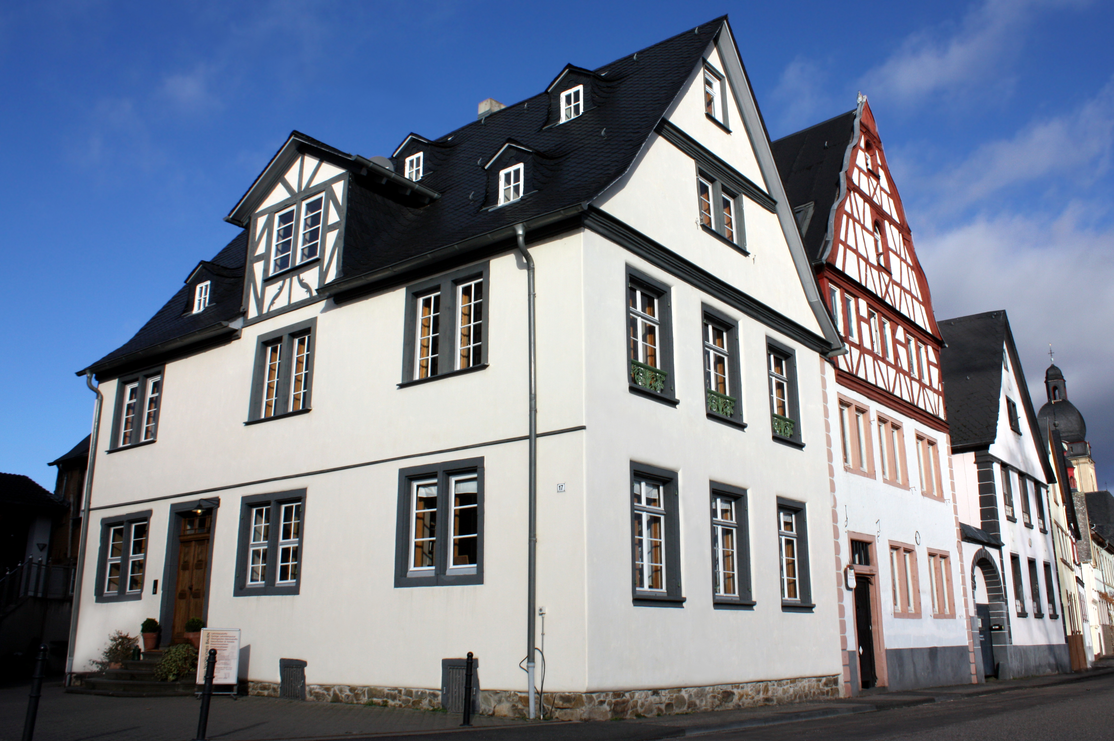 Koblenz-Neuendorf, Am Ufer 17. Denkmalgeschütztes Fachwerkhaus mit Bruchsteinsockel im EG am Rhein bei Koblenz. In den Jahren 1999 bis 2010 behutsam mit Holz, Kalk und Lehm restauriert.